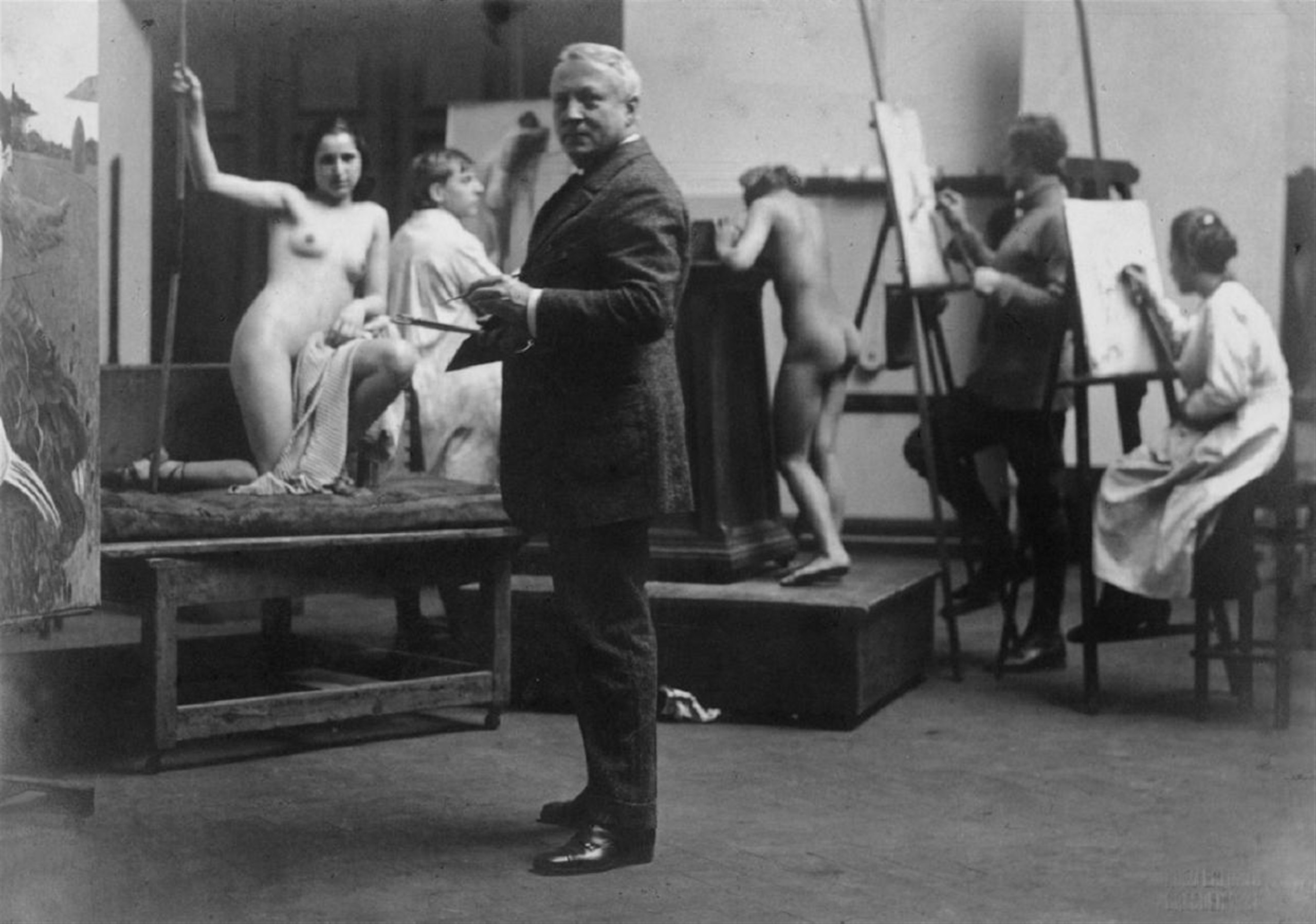 Der Maler Richard Müller (1874–1954) mit Modell im Atelier. Foto von Hugo Erfurth (Gelatinesilberabzug matt. 16 x 23 cm)